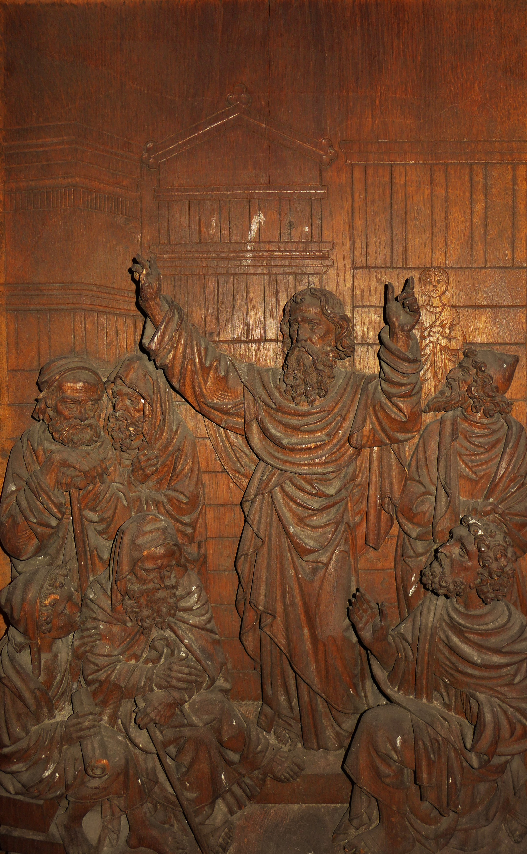 St. Josef (Saarbrücken), Kanzelrelief, Paulus predigt auf dem Areopag